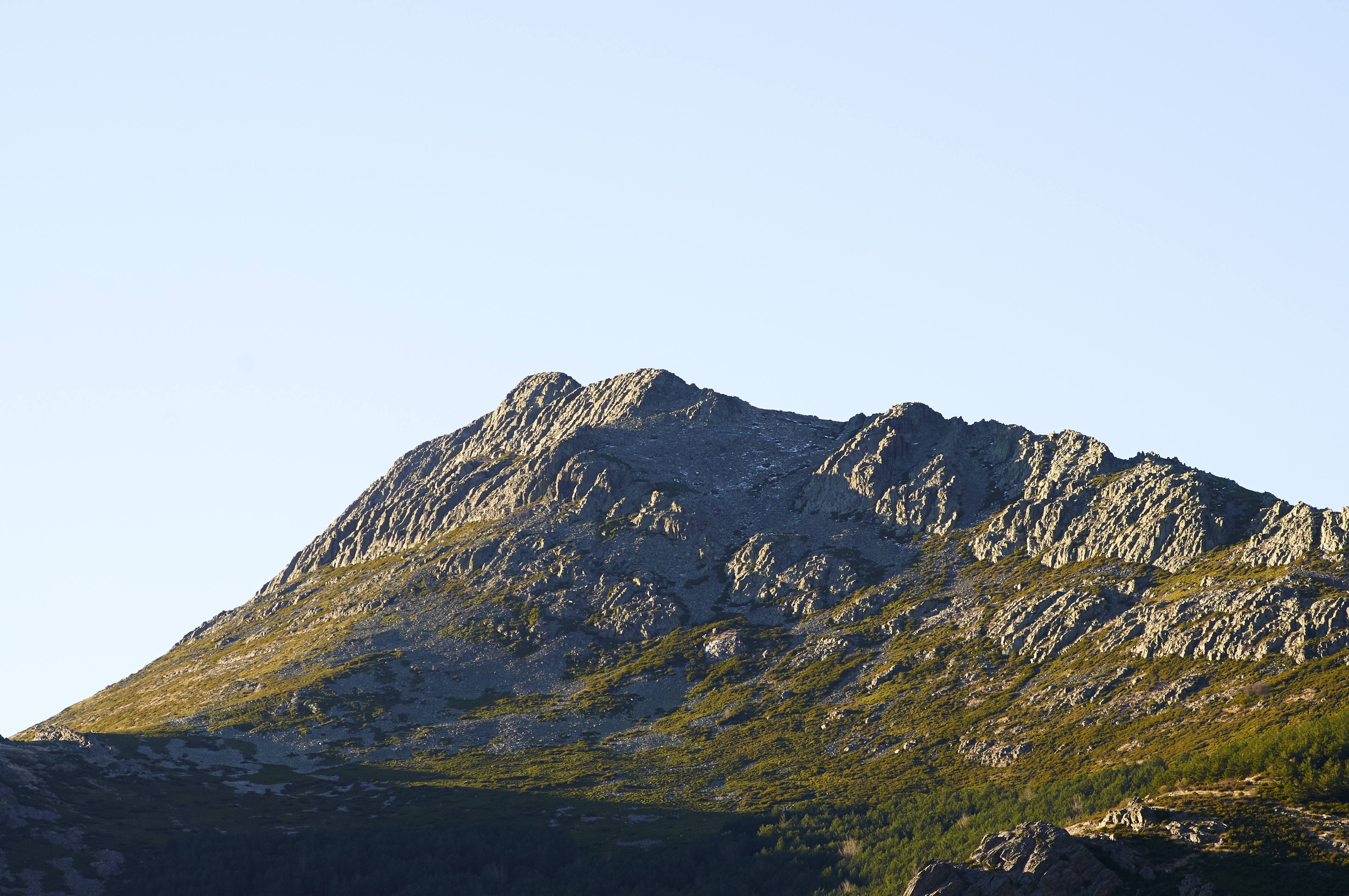 Pico